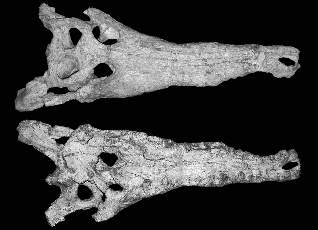 Tomistomine crocodile Megadontosuchus arduini (de Zigno, 1880), MGPD 1Z, lectotype from Monte Duello (Roncà, Province of Verona, NE Italy); middle Eocene.